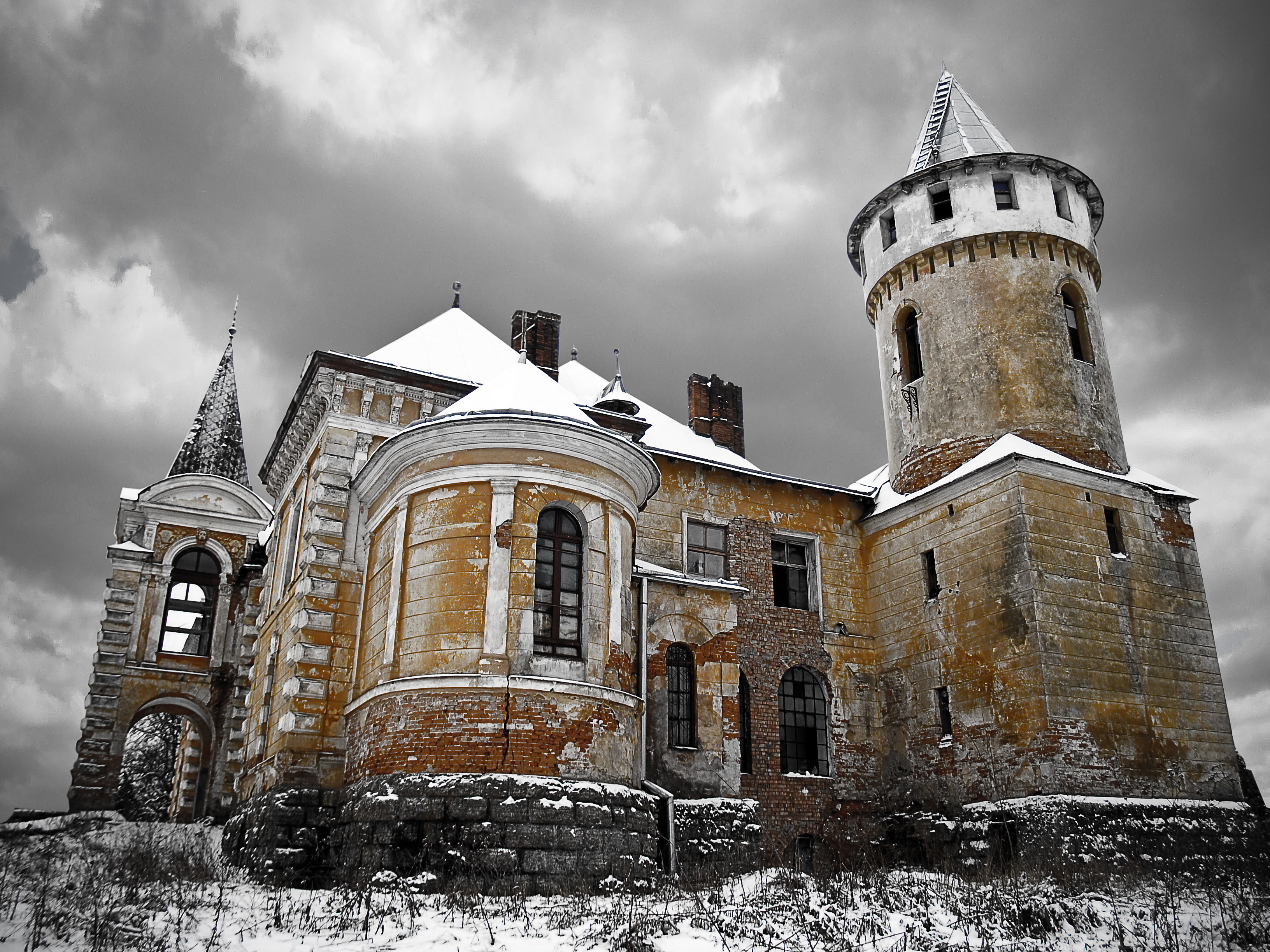 Садиба Рея (XVIII - XIX ст.) - маєток у Псарах, належав графському роду Реїв, нащадкам древнього роду Потоцьких.